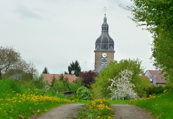 Le clocher de l'Eglise de Rarécourt